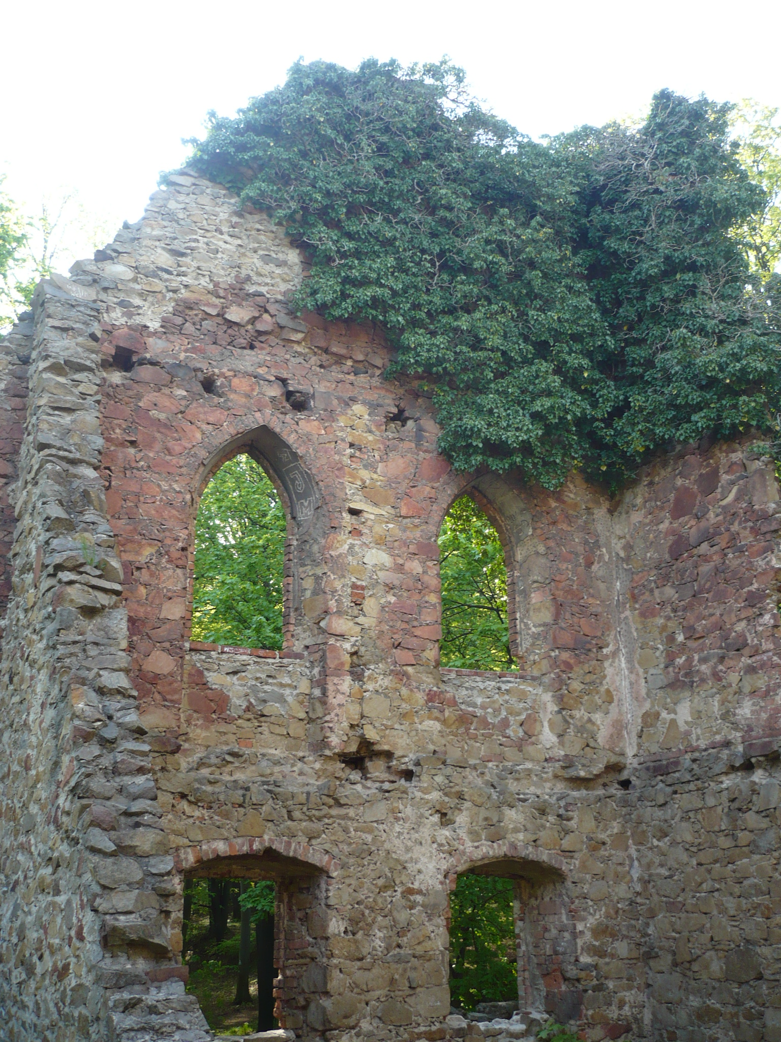 Stary Książ